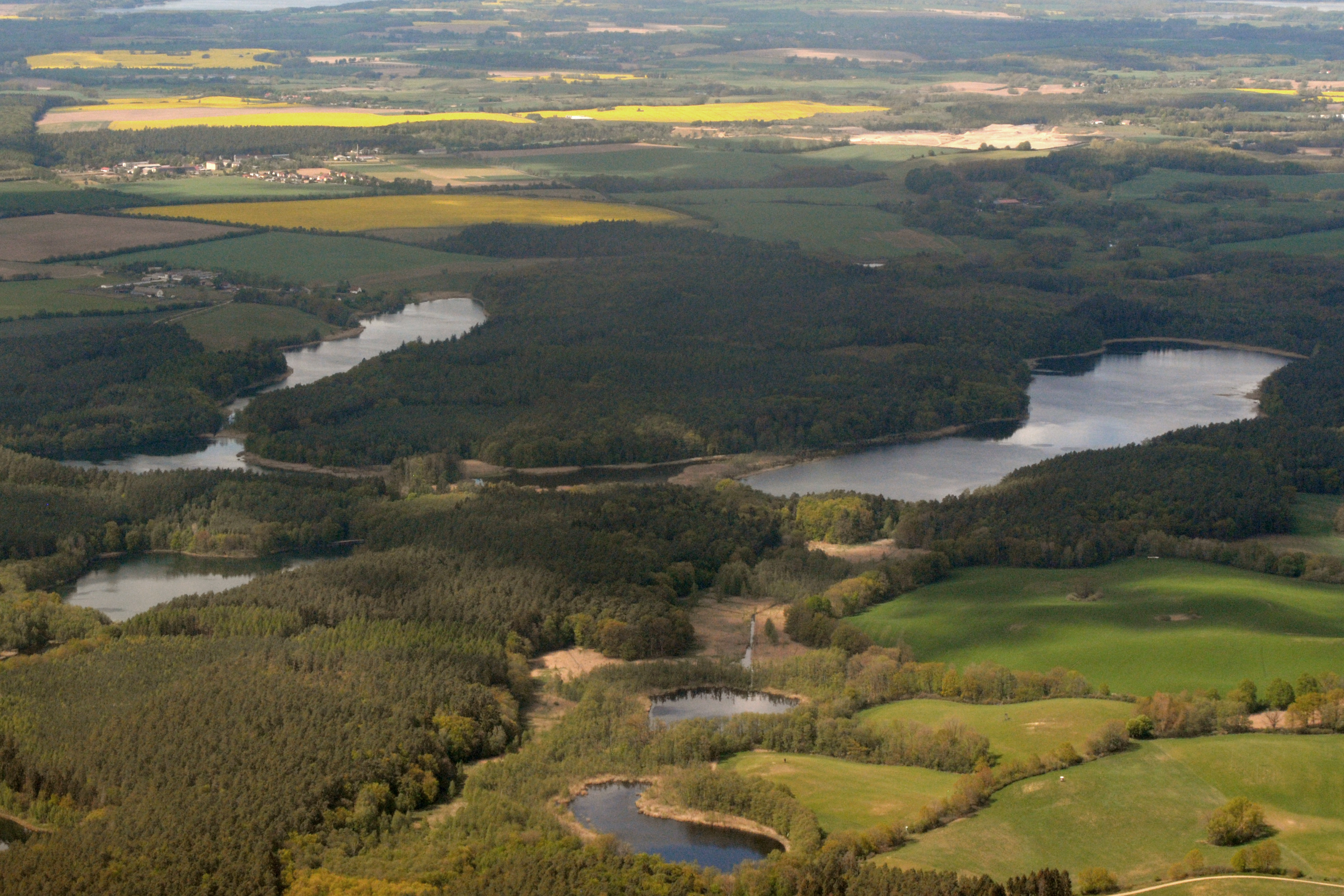 Havelquellgebiet